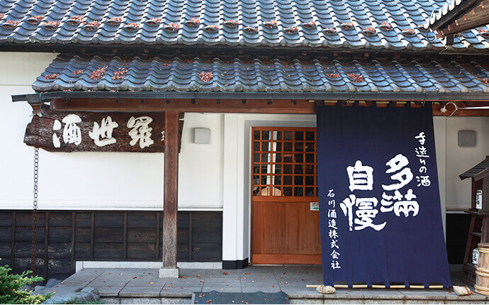 多満自慢 敷地内売店「酒世羅」